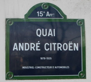 Plaque de rue du quai André Citroën, à Paris.